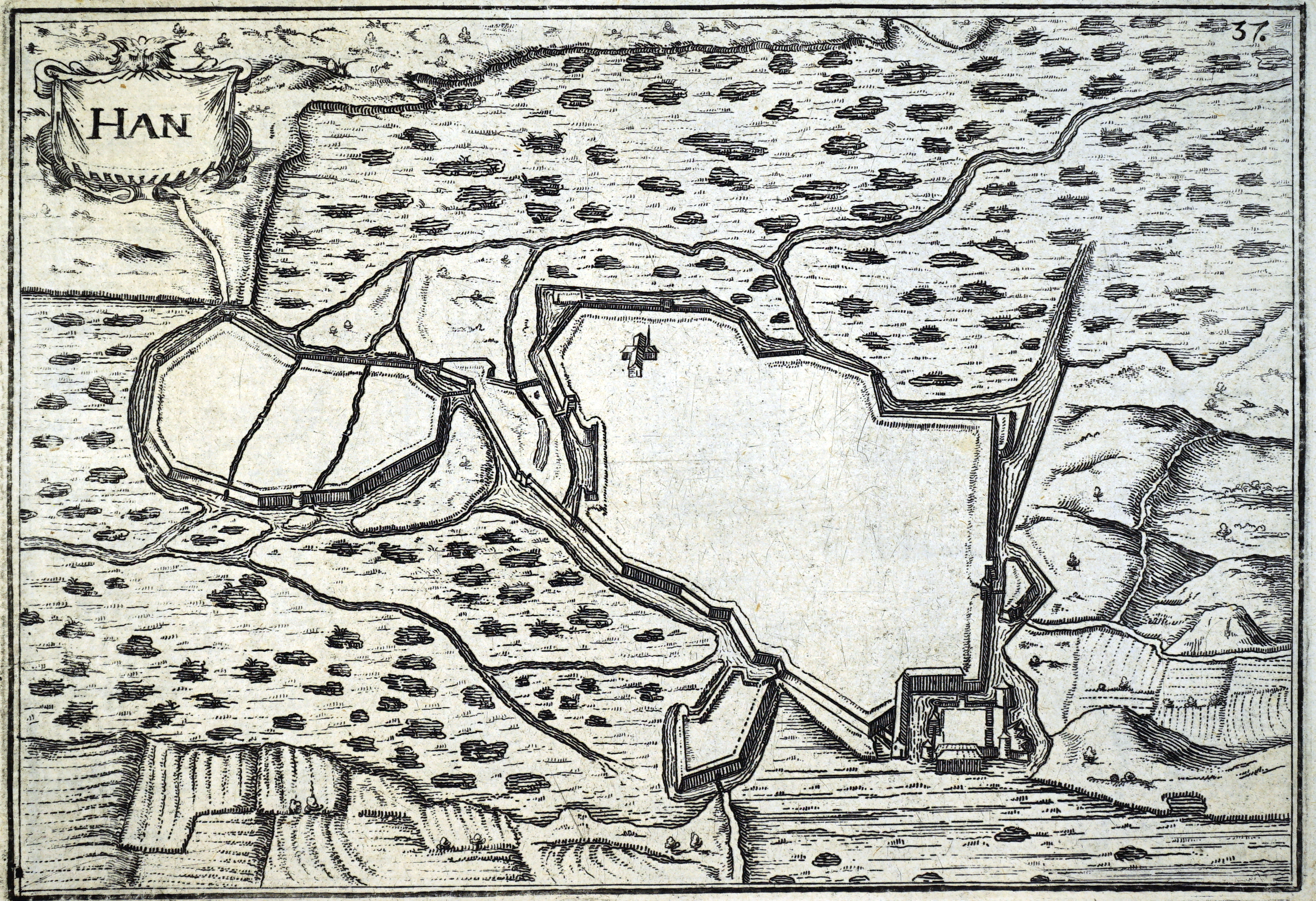 publié par C. Tassin.